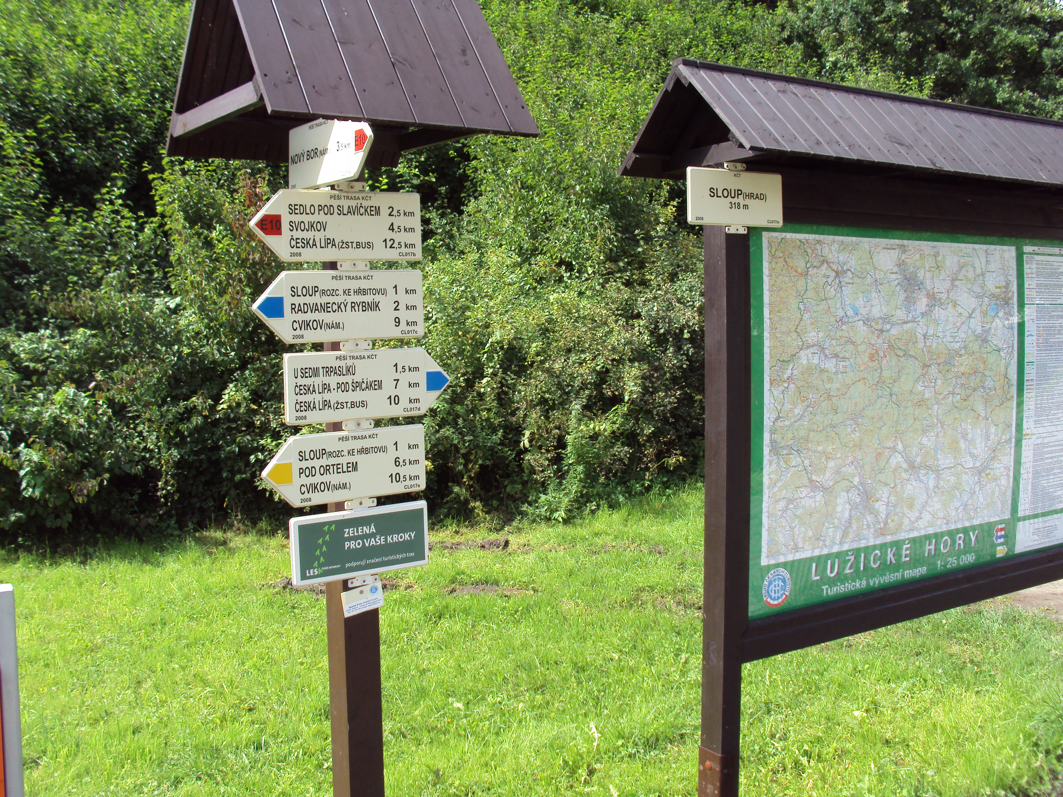 Turistické rozcestníky u skalního hradu Sloup v Čechách